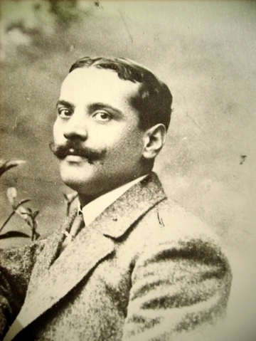 Luis Josa de Gomar. Comisario de la Generalitat de Lleida (1934-1936)